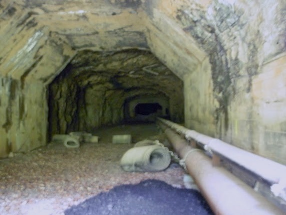 Stollenanlage Schwalbe I im Hönnetal, Hemer-Deilinghofen